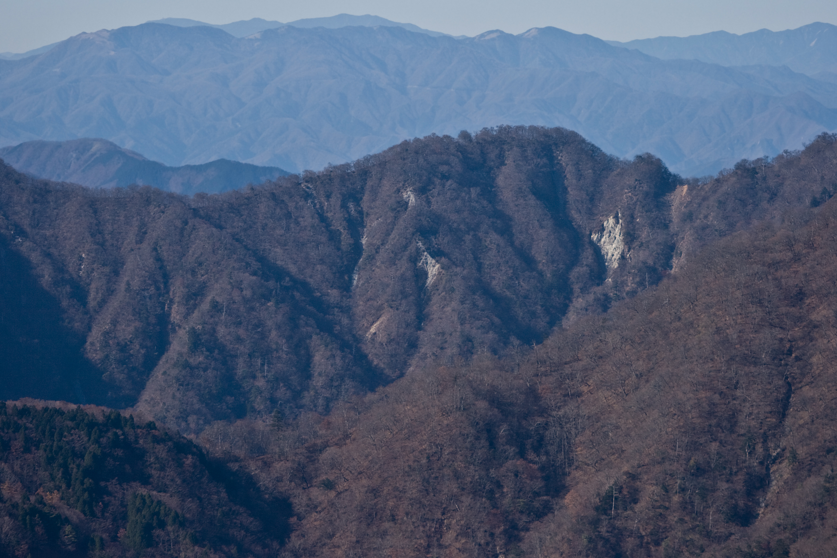 塔ノ岳よりミカゲ沢ノ頭